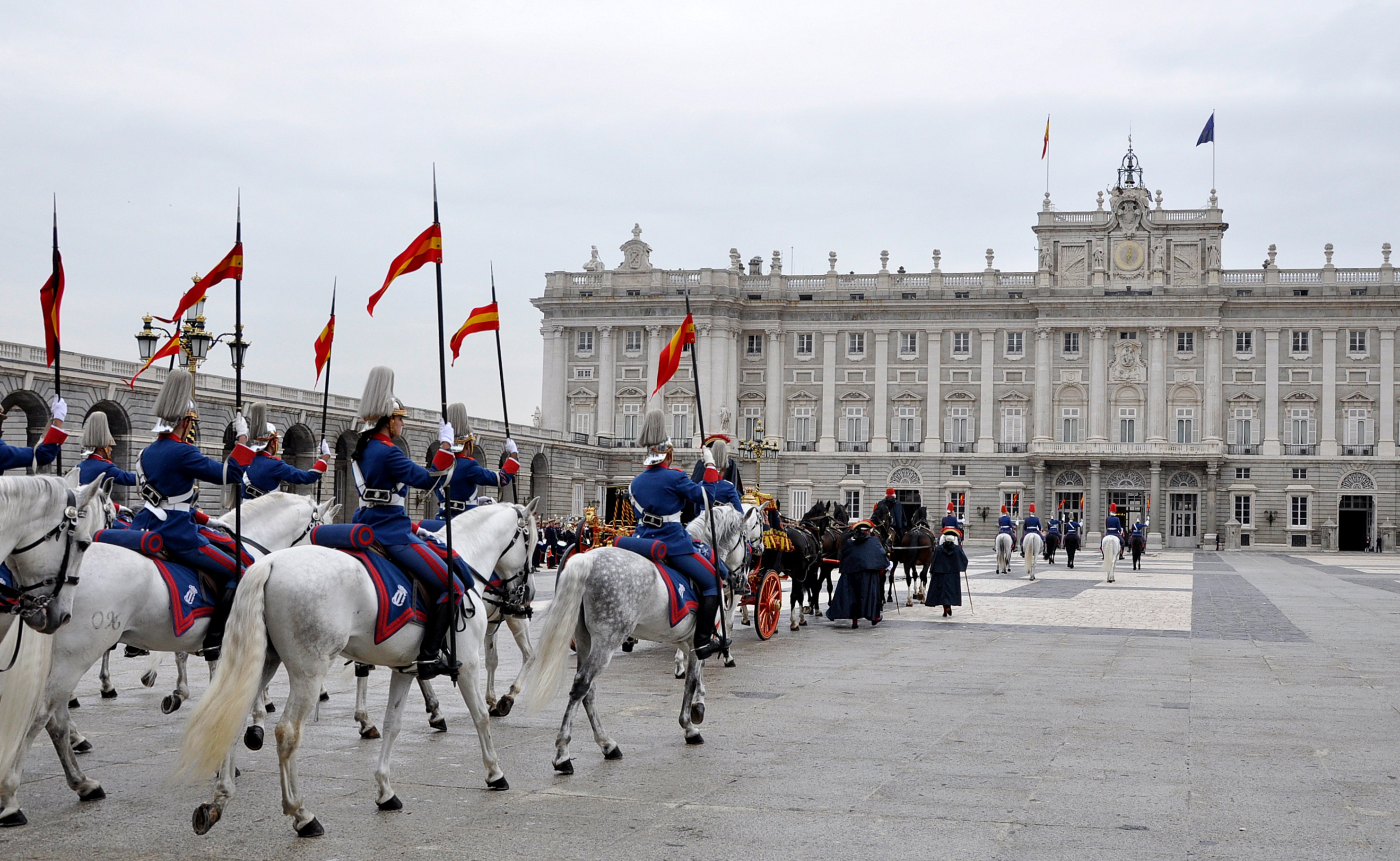 Nieuwe ambassadeur (van Argentinië?) komt zijn geloofsbrieven overhandigen aan de koning van Spanje in het koninklijk paleis van Madrid